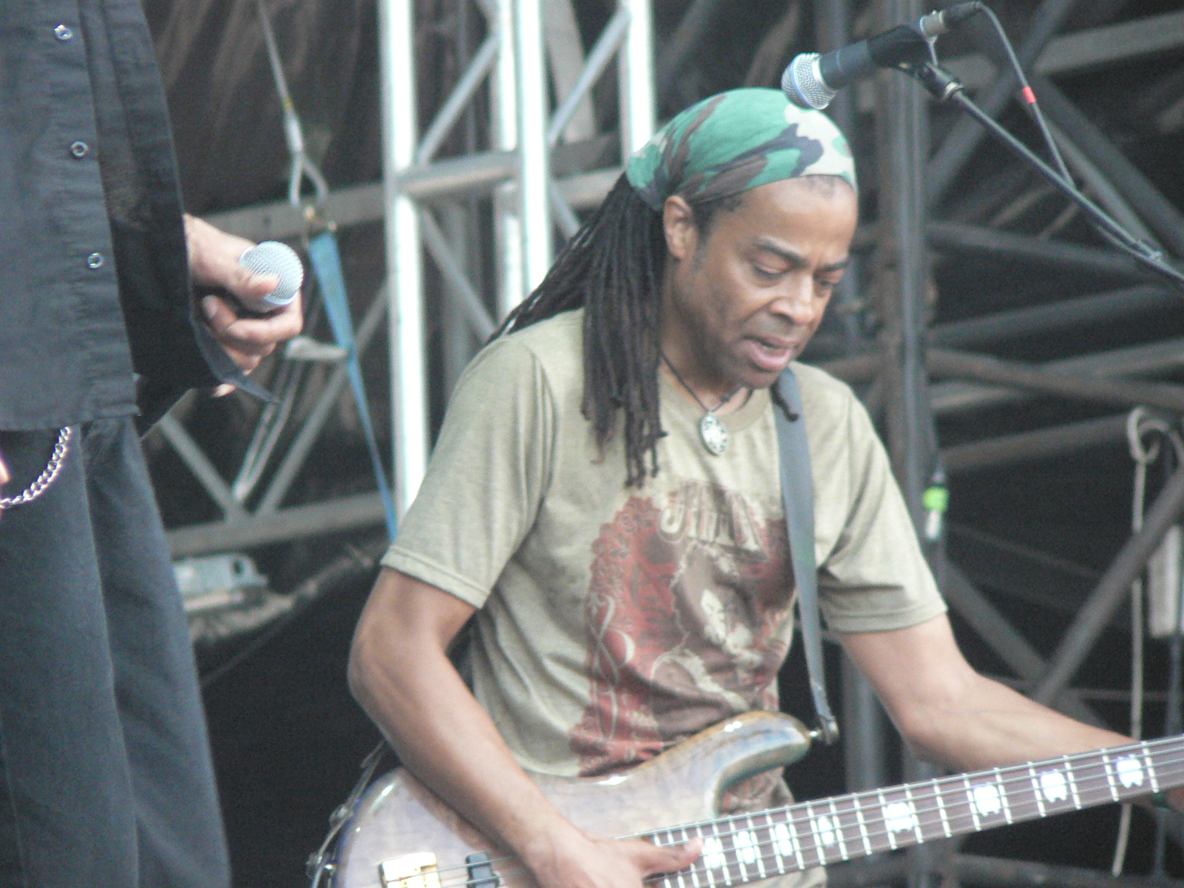 A felvétel 2006. augusztus 15-én készült Budapesten. Sziget Fesztivál, Living Colour koncert a Nagyszínpadon. ©© Derzsi Elekes Andor, Budapest, 2014, A kép egészben, vagy részletekben másolását, bármilyen úton történő sokszorosítását és felhasználását a szerző ellenérték nélkül, jogutódjaira is kihatóan megengedi. Az engedély kiterjed a kereskedelmi célú hasznosításra is. Kéri azonban nevének feltüntetését a felhasználás során. A Metapolisz sorozat valamennyi képe és filmje Creative Commons alatti valamint kereskedelmi - for profit - célra is felhasználható. Ajánlott hivatkozás: Derzsi Elekes Andor: Metapolisz DVD line